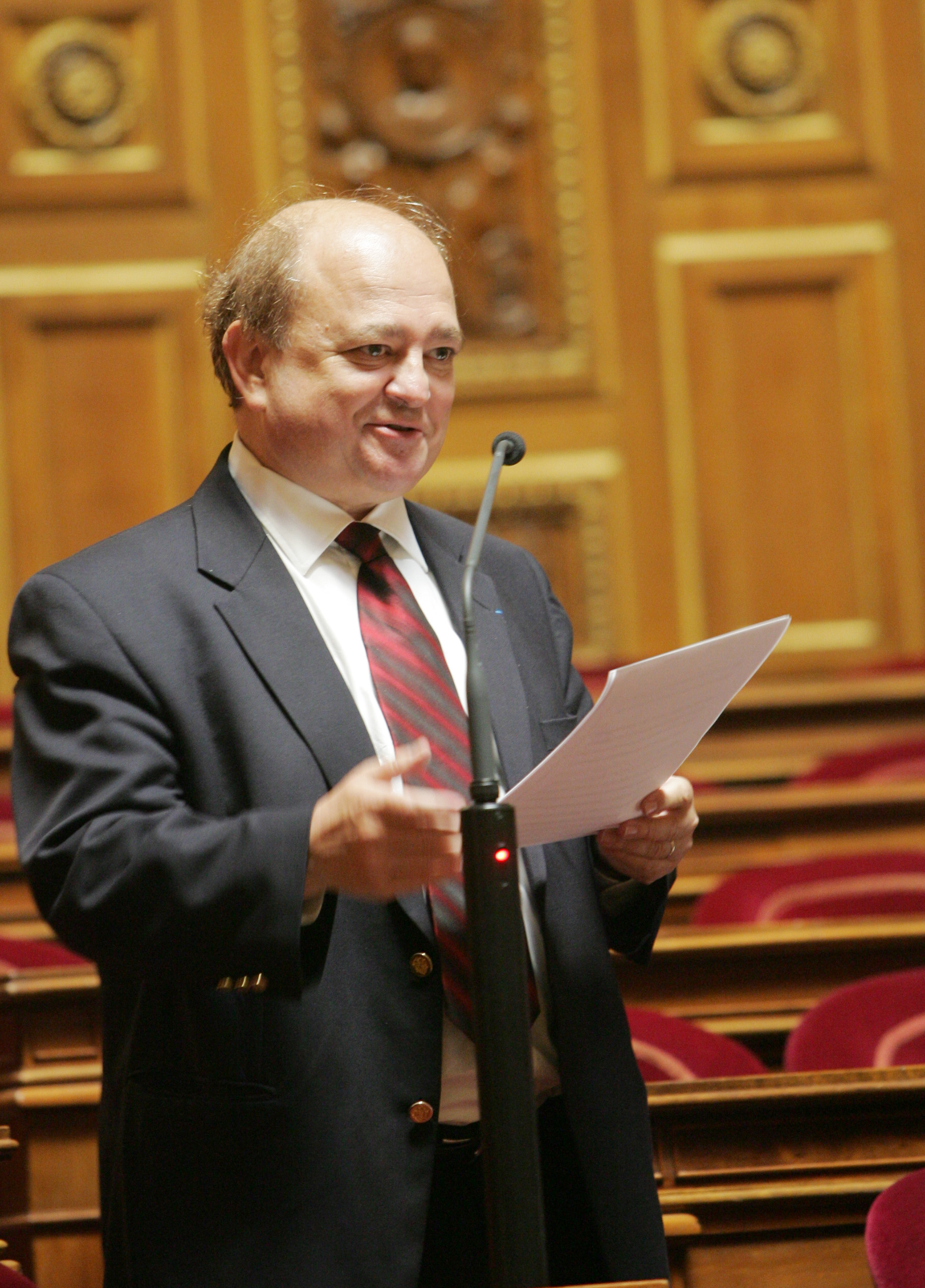 Jean Besson dans l'hémicycle du Sénat en 2007